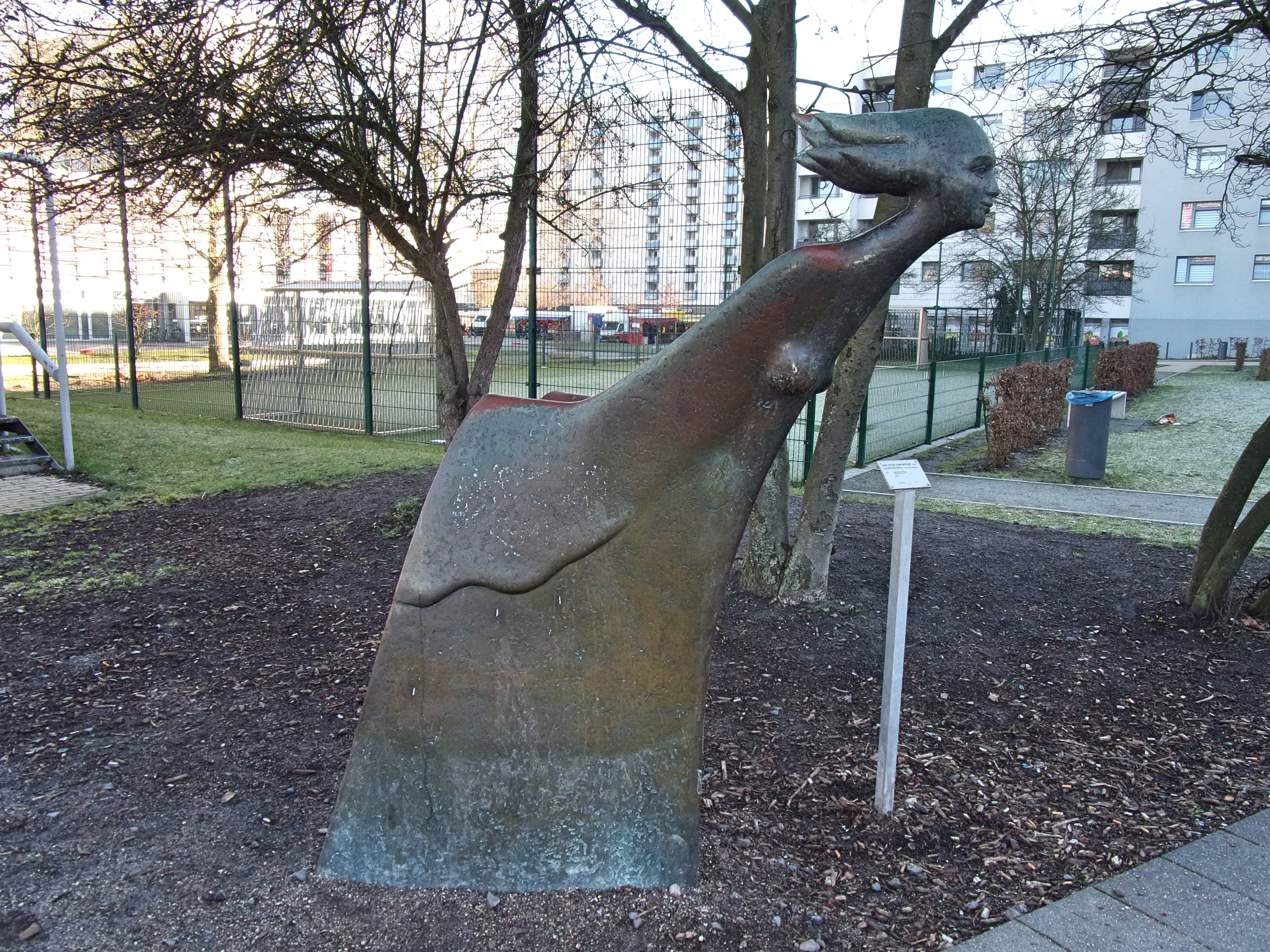 Skulptur Frauenkörper im Wind, 1985 Bronze, Künstlergemeinschaft Prof. Stefan Schwerdtfeger und Diether Heisig. Standplatz auf dem Spielplatz an der Bahnhofspassage in der Nähe der Bücherhalle Kirchdorf.